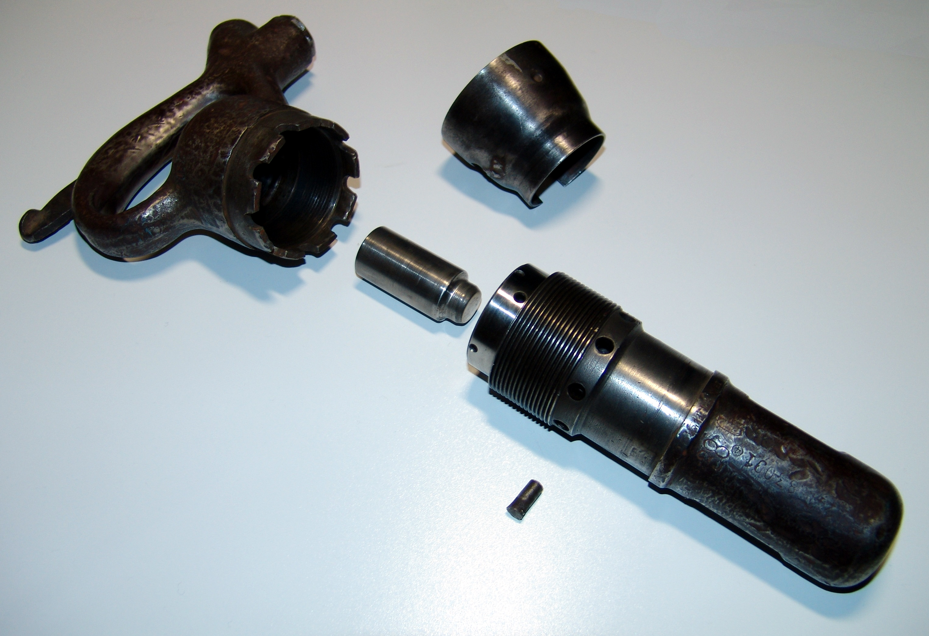 alter Presslufthammer (Länge ca. 280mm / Meißel (Durchmesser) ca. 20mm), Hersteller (eingeschlagen): DEPRAG Amberg, 960.07/210, 38GE., (unlesbar) 1/4 No.83-091